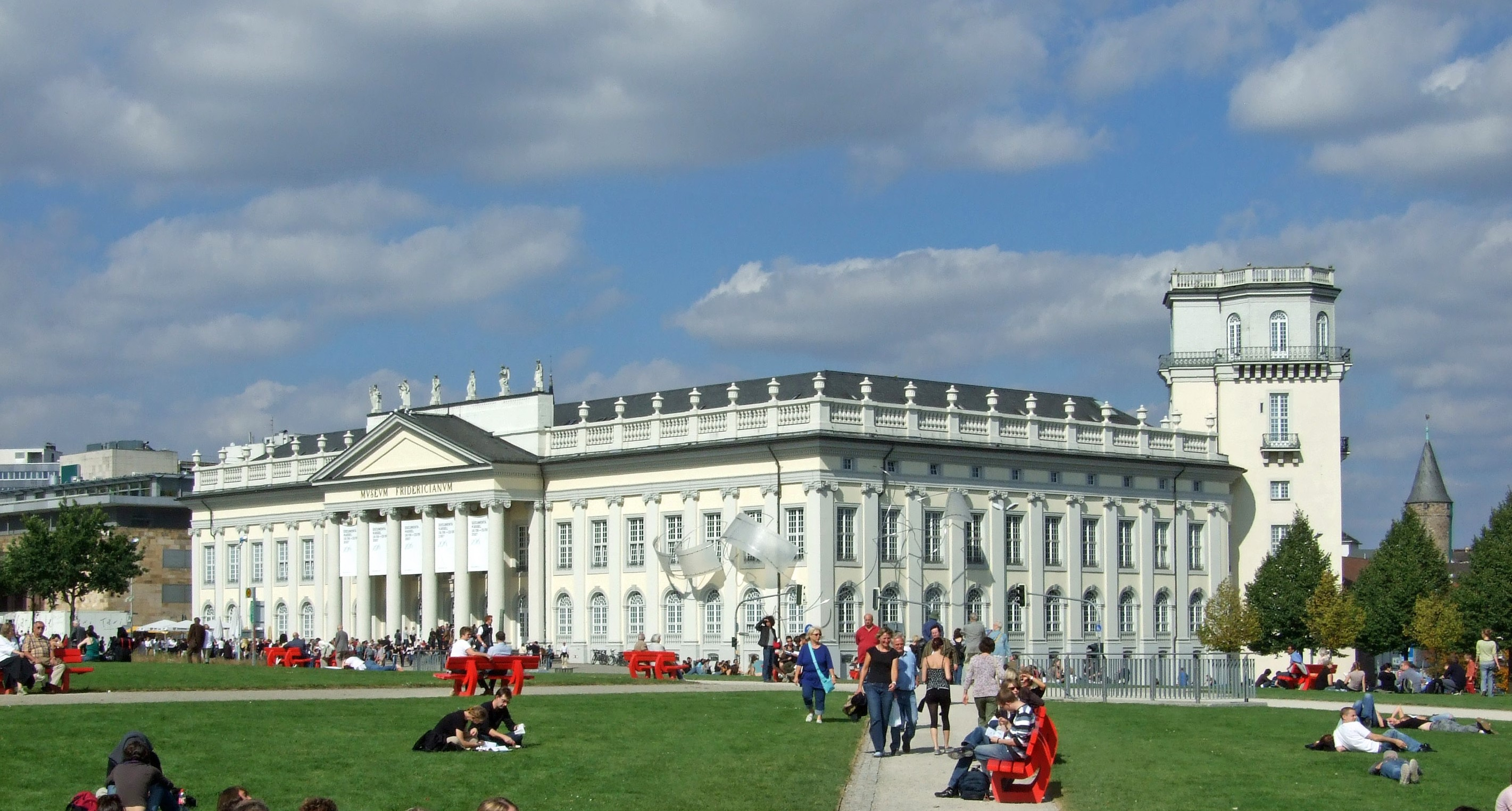 Fridricianum in Kassel, waehrend der Documenta 2007